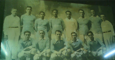 Club Atlético Belgrano de Rosario, campeón de la Copa Vila (Liga Rosarina de Football) 1924.